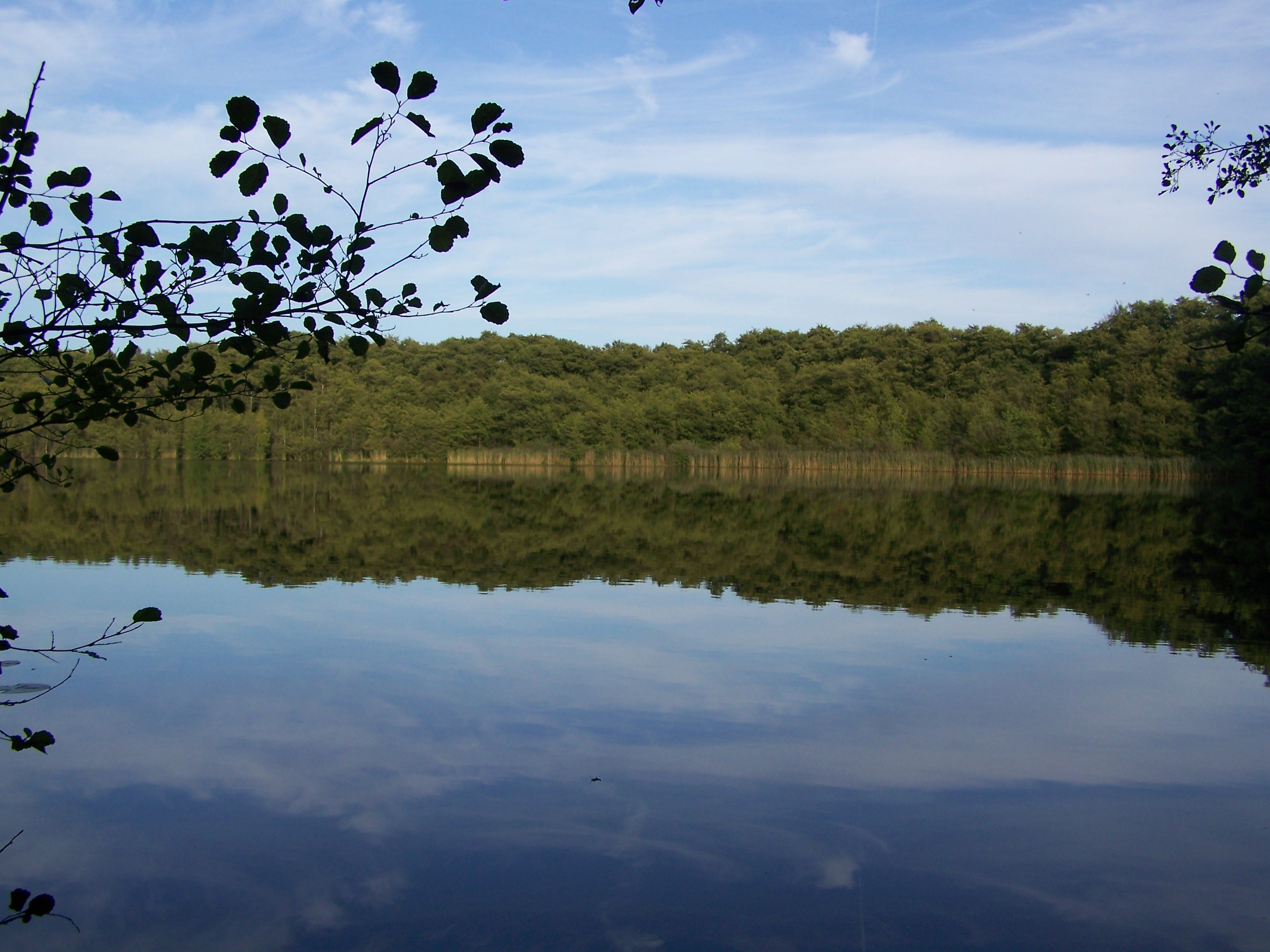 Blick auf die Seefläche das Großen Heiligen Meeres zwischen Hopsten und Obersteinbeck.